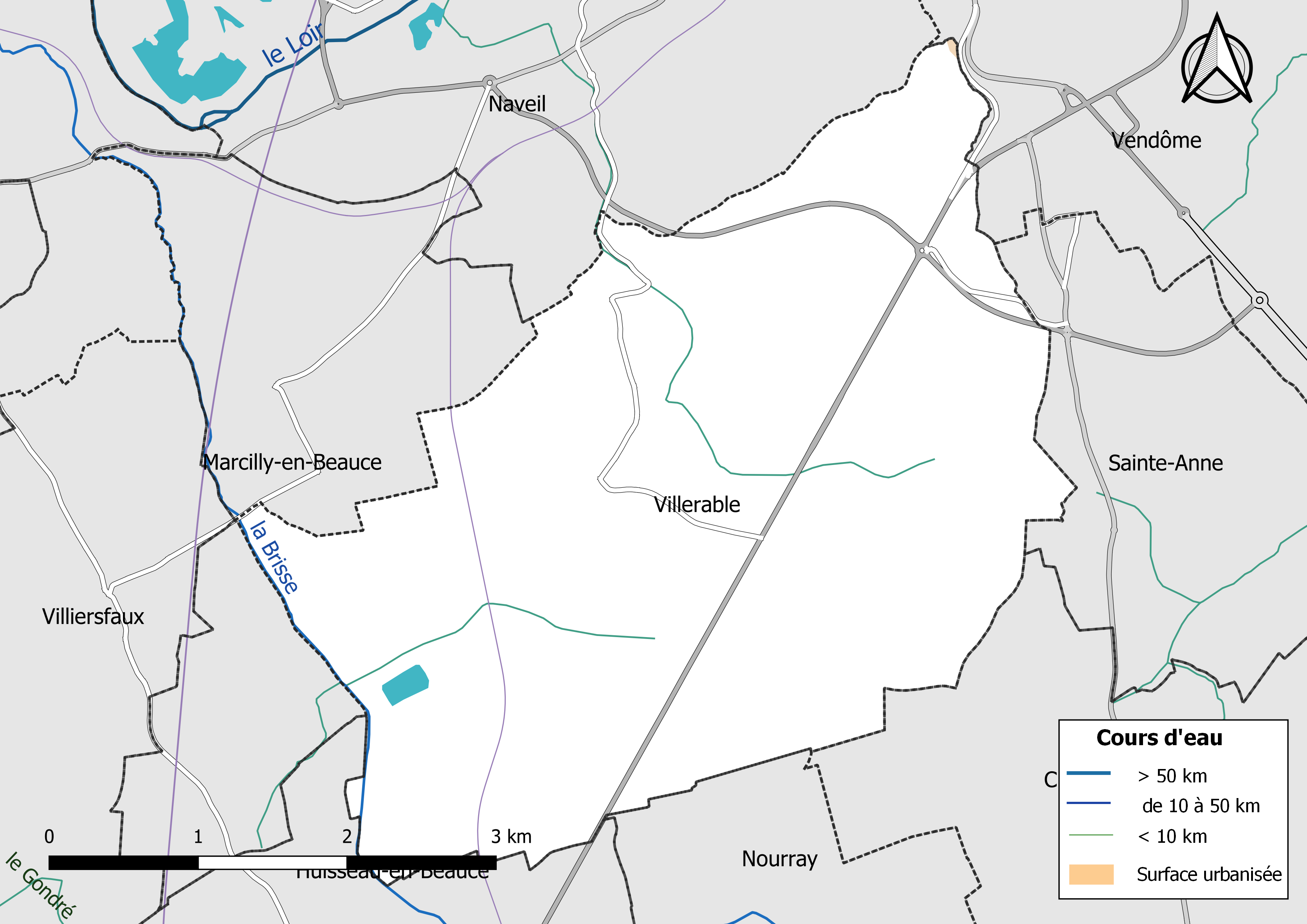 Carte du réseau hydrographique de la commune de Villerable (Loir-et-Cher, France).